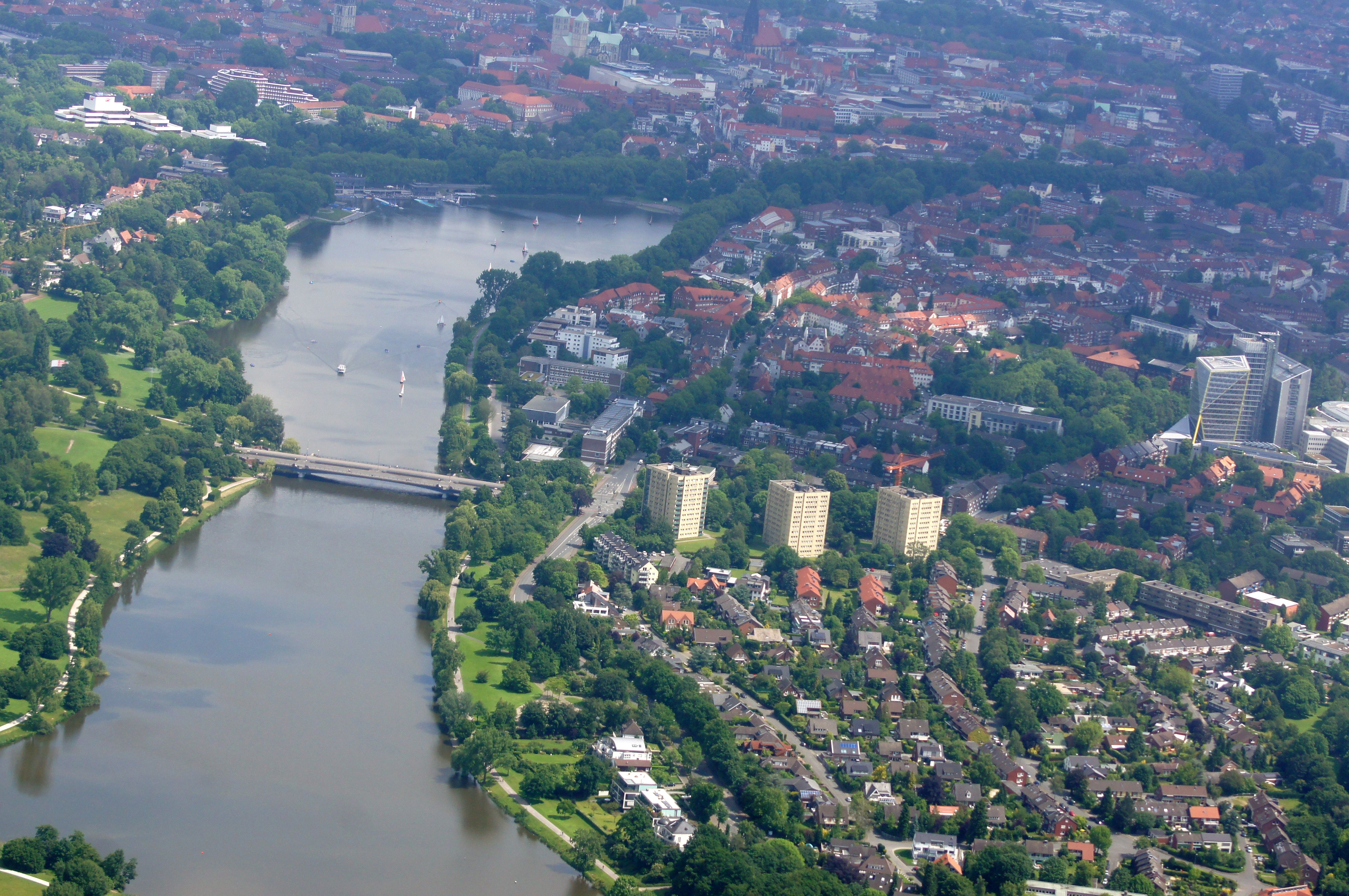 Der Aasee in Münster, Nordrhein-Westfalen, Deutschland. Das Foto entstand während des Münsterland-Fotoflugs am 1. Juni 2014. Hinweis: Die Aufnahme wurde aus dem Flugzeug durch eine Glasscheibe hindurch fotografiert.